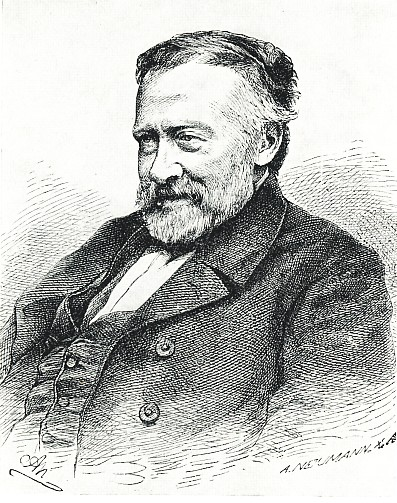 Erzähler Willibald Alexis.